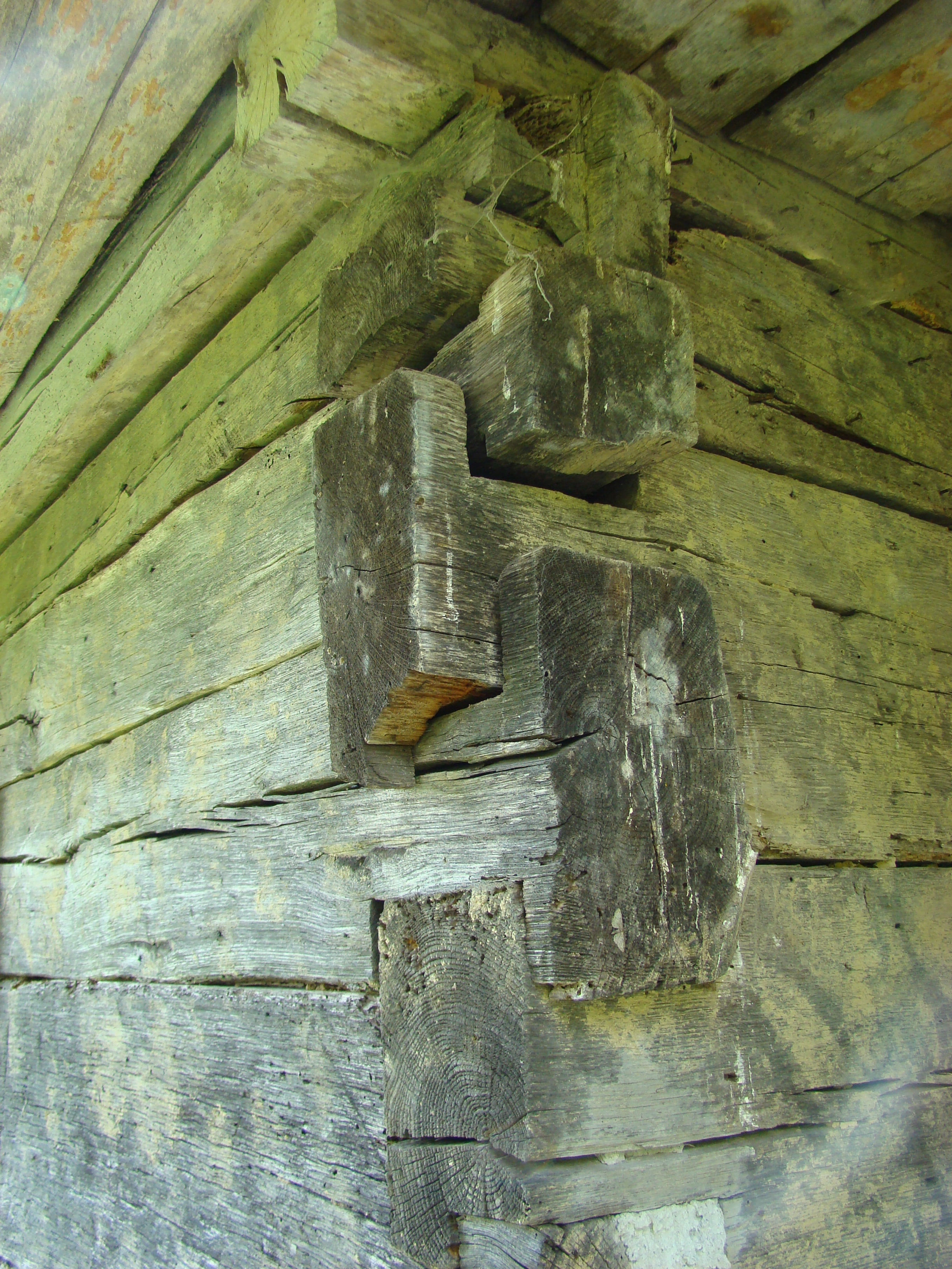 Biserica de lemn "Sf. Ioan Evanghelistul" , sat IZVOARELE; comuna CERNEŞTI